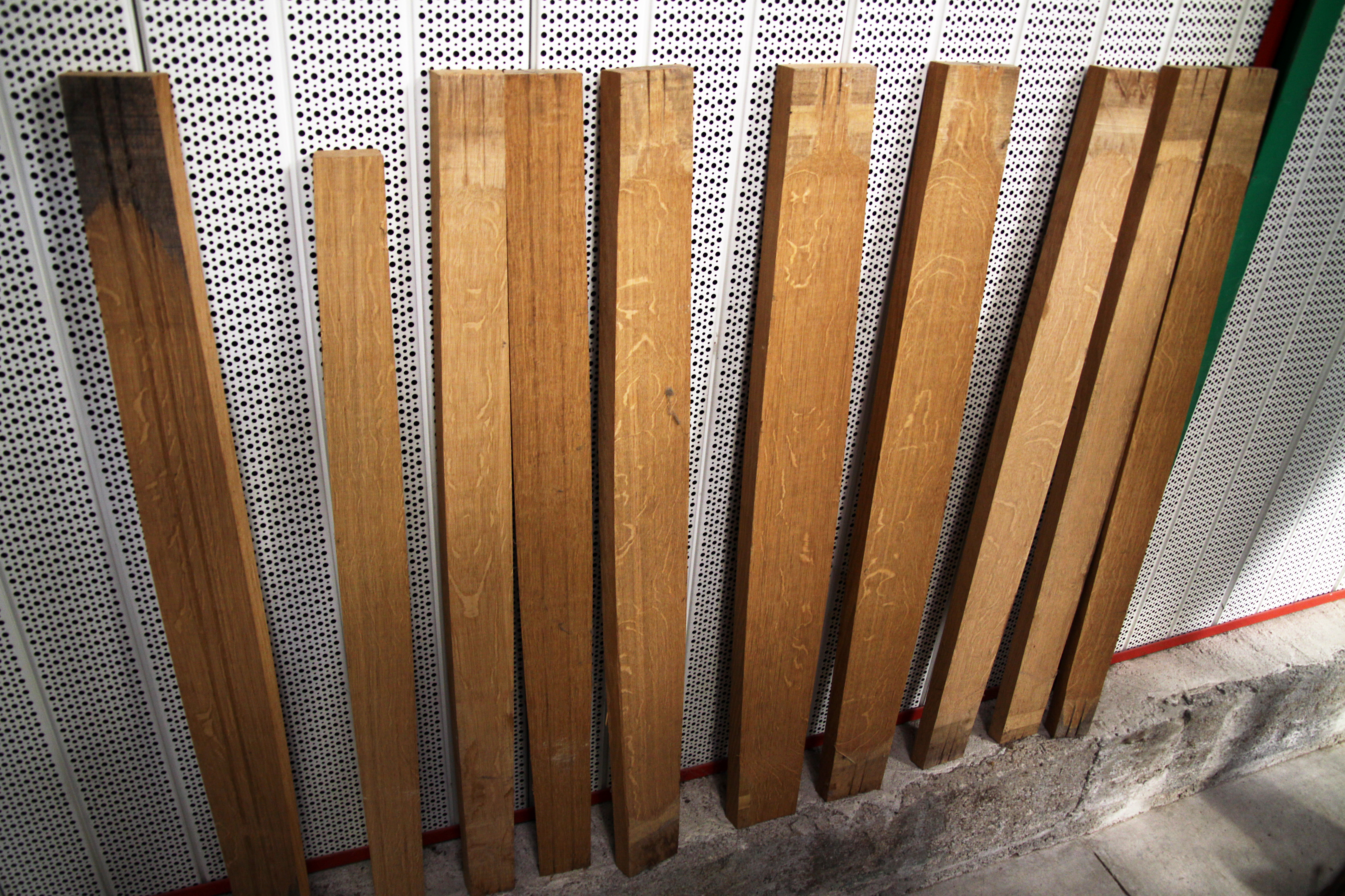 Douelles de différentes tailles, pour la production de tonneaux